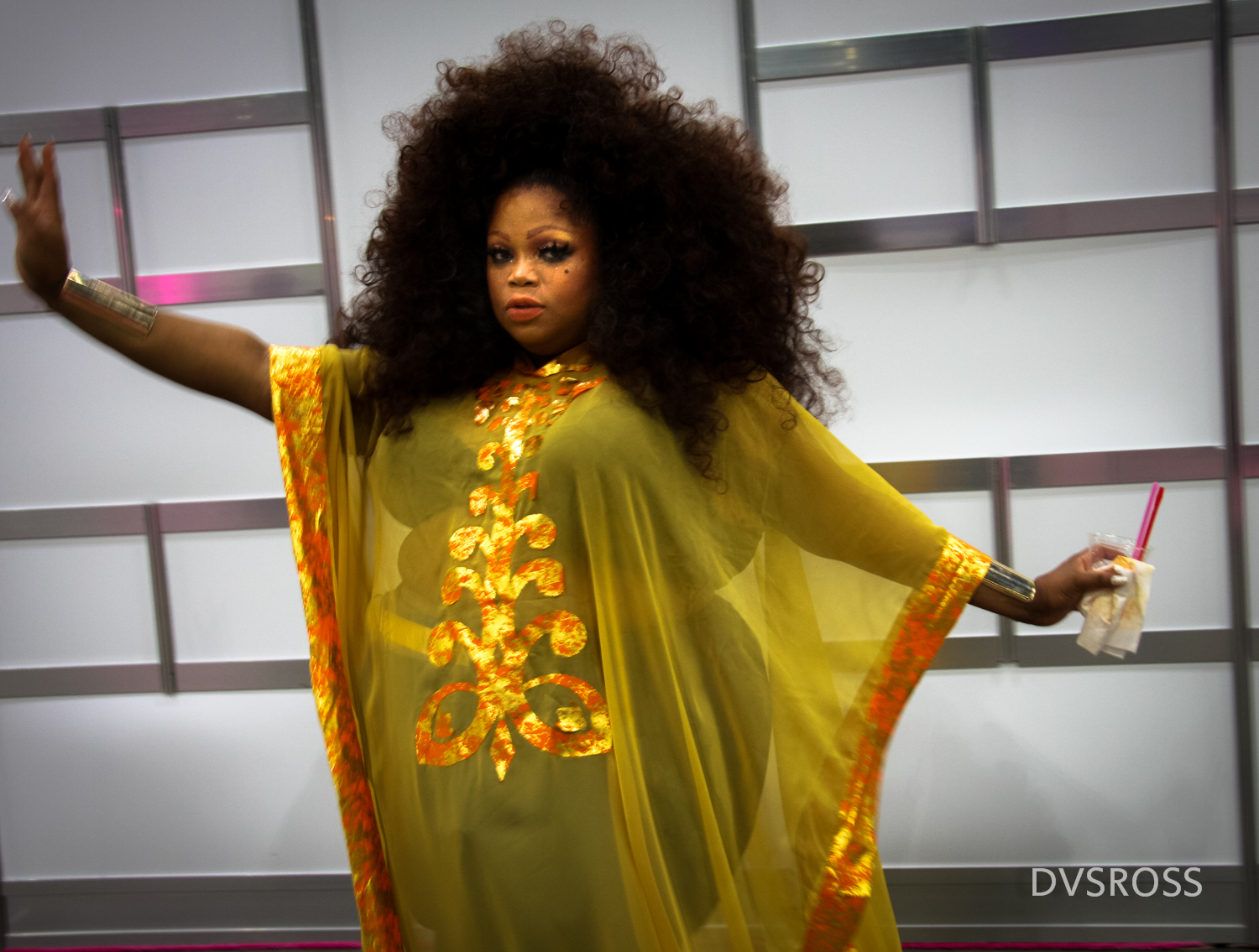 Rupaul DragCon 2019 - Los Angeles